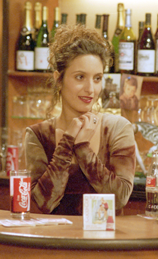 Sabine Koning